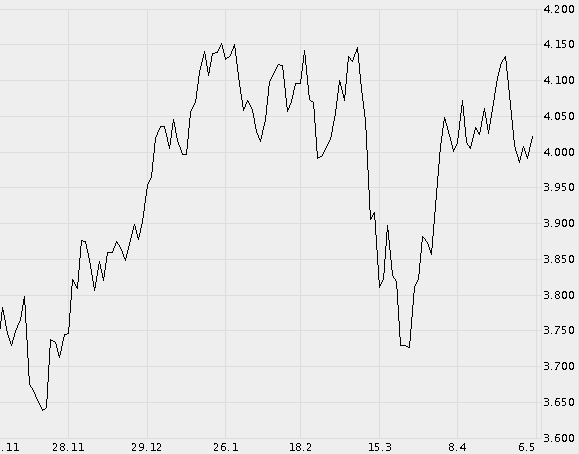 Linienchart vom aktuellen DAX!